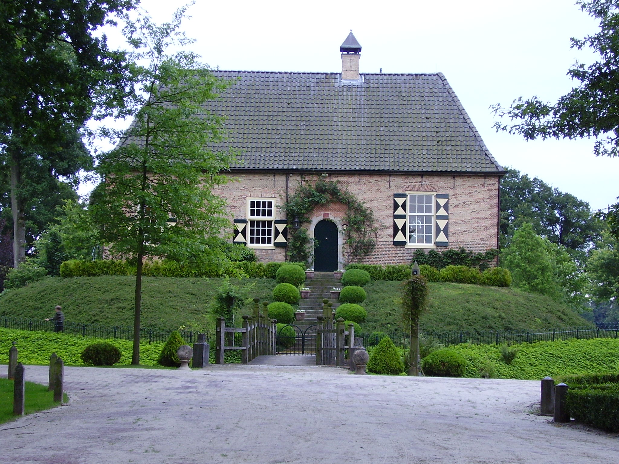 Huis De Eese